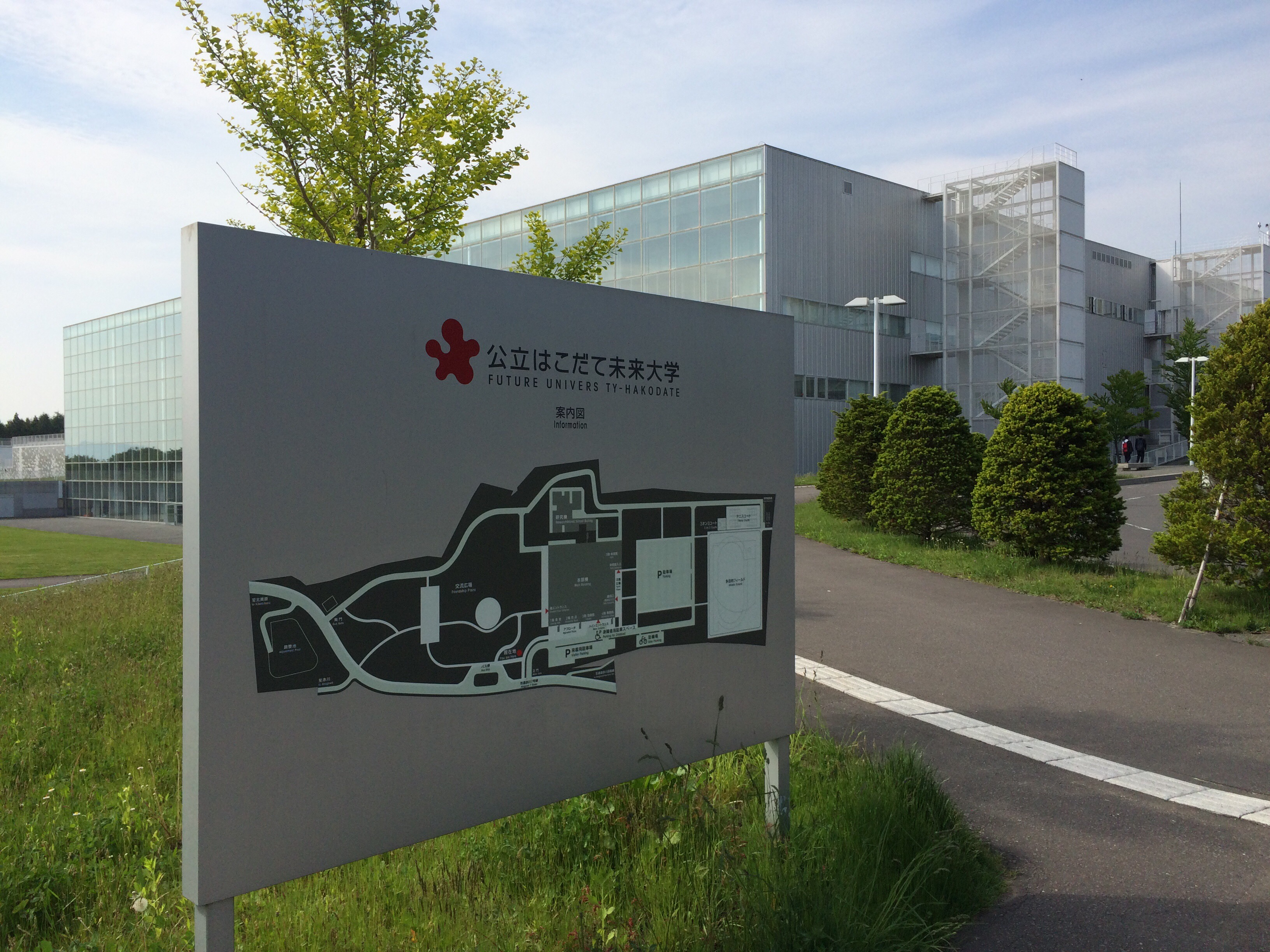 公立はこだて未来大学